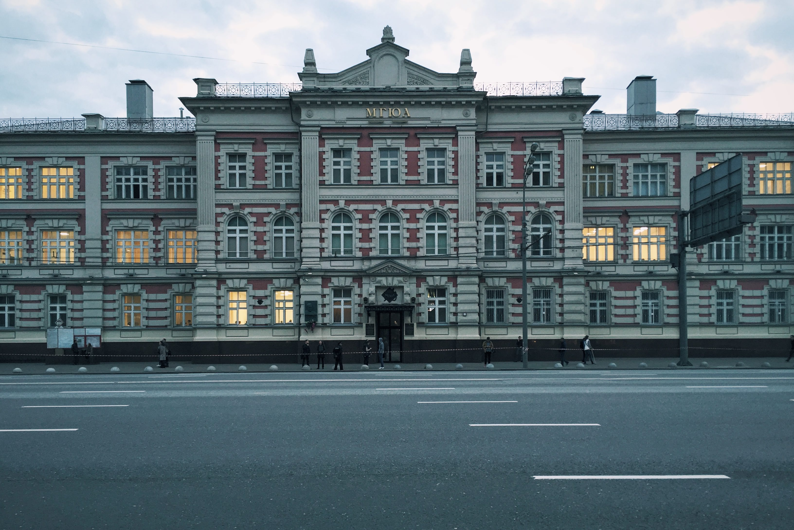 Садовая-Кудринская 9. Московский государственный юридический университет имени О. Е. Кутафина (МГЮА). Бывшее здание реального училища, построенного в 1901 году по проекту гражданского инженера А. А. Никифорова.